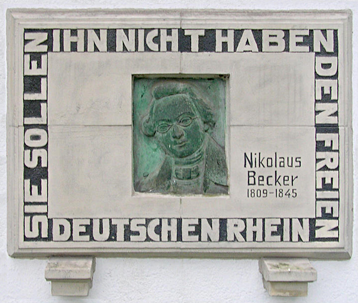 Geilenkirchen, Gedenktafel für den hier verstorbenen Dichter Nikolaus Becker an der katholischen Pfarrkirche “Johann Baptist” in Hünshoven